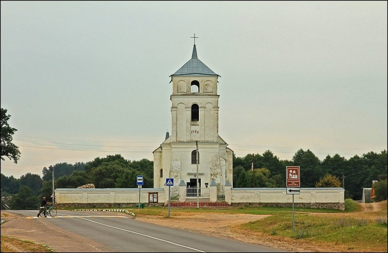 Новы Свержань. Касцёл Святых Пятра і Паўла